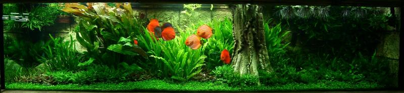 4.000 litros